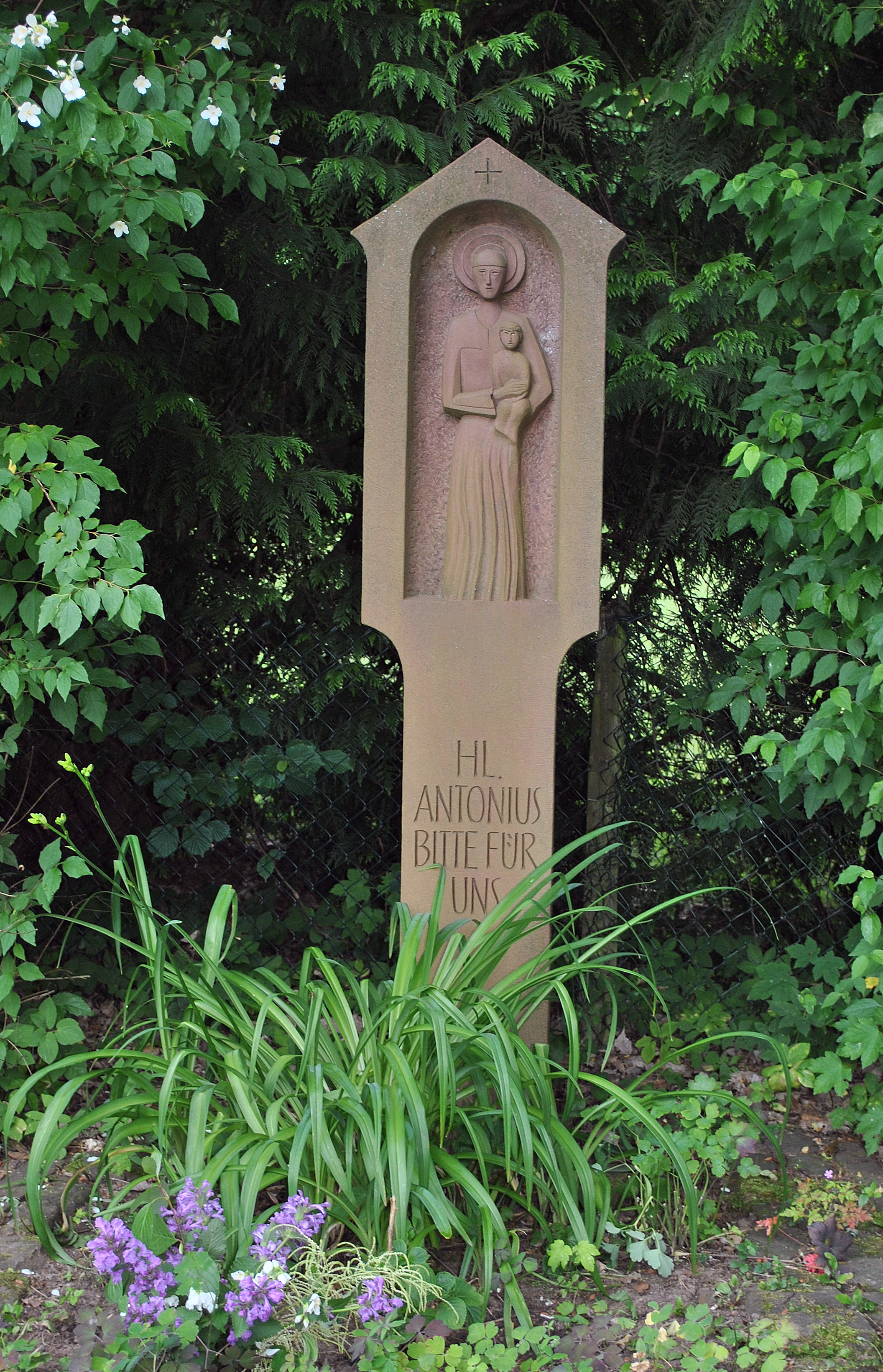 Moderner Bildstock an der Hauptstraße von Hesselbach (nördlicher Ortseingang)